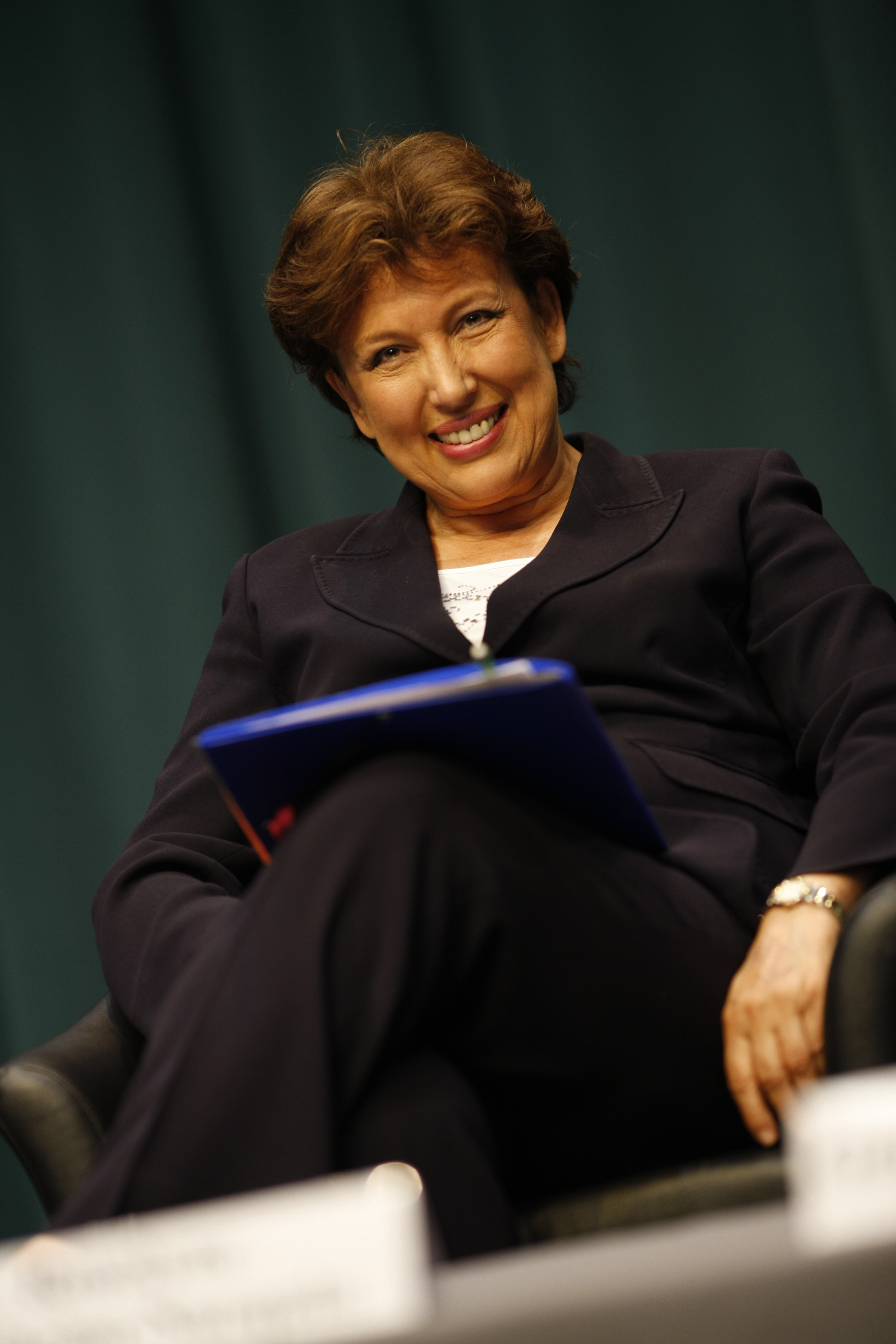 Roselyne Bachelot - Narquin